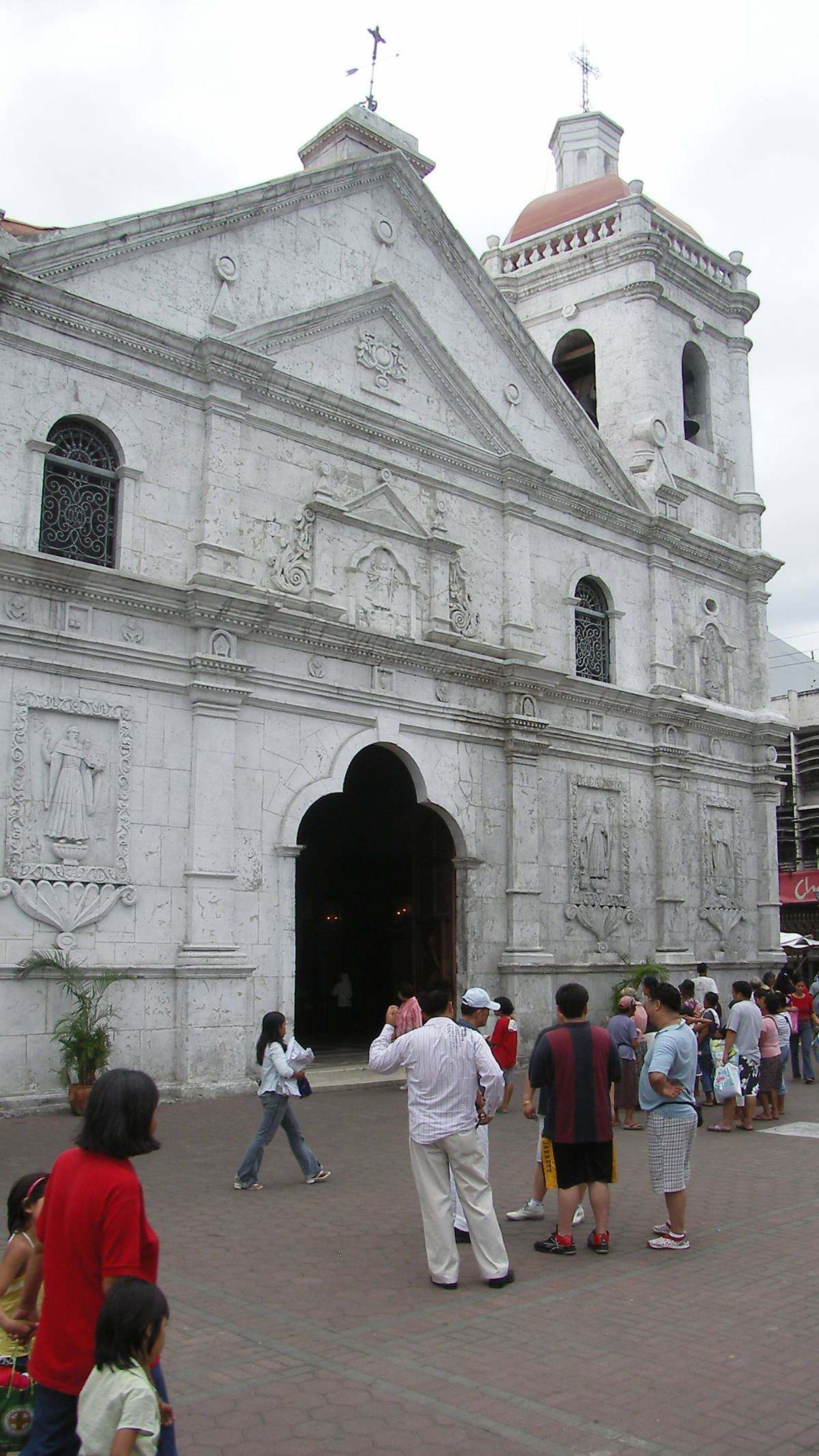 Santo Nino - erste Kirche auf Cebu, im historischen Zentrum von Cebu-Stadt, April 2006